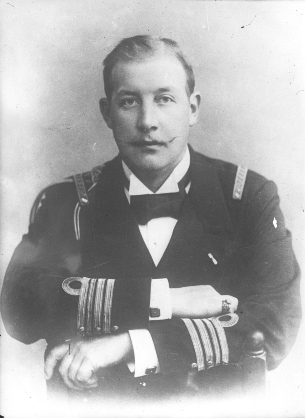 Prince Georges de Grèce.